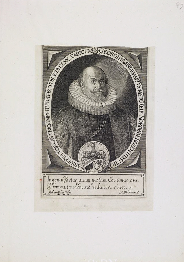 Georg Abraham Pömer, Pfleger der Mendelschen Zwölfbrüderstiftung; mit den Wappen von Pömer und seiner Frau Helene geb. Bayer Transkription und weitere Informationen